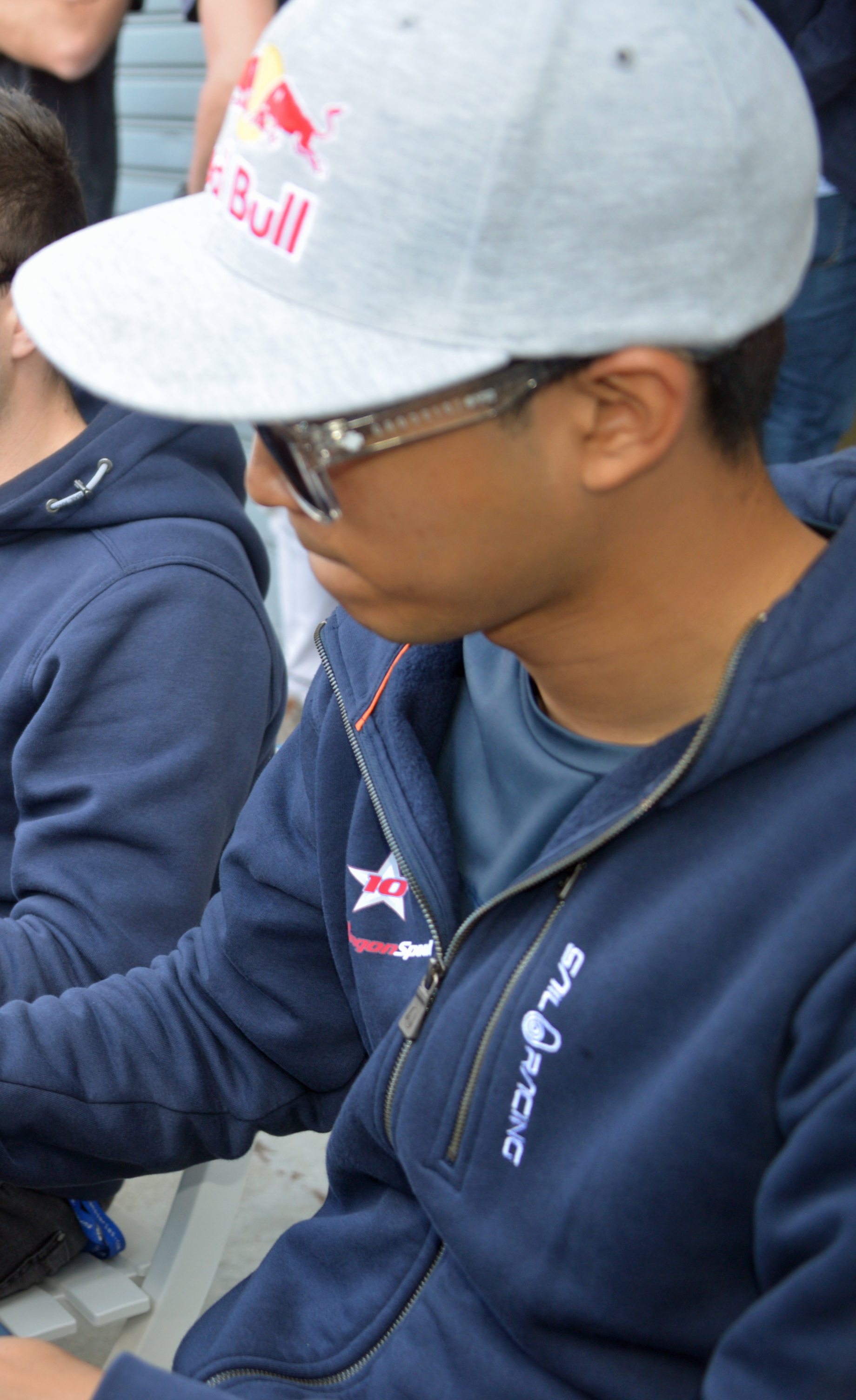 Séance d'autographes pour les pilotes de la #22 Memo Rojas, Ryo Hirakawa et Léo Roussel